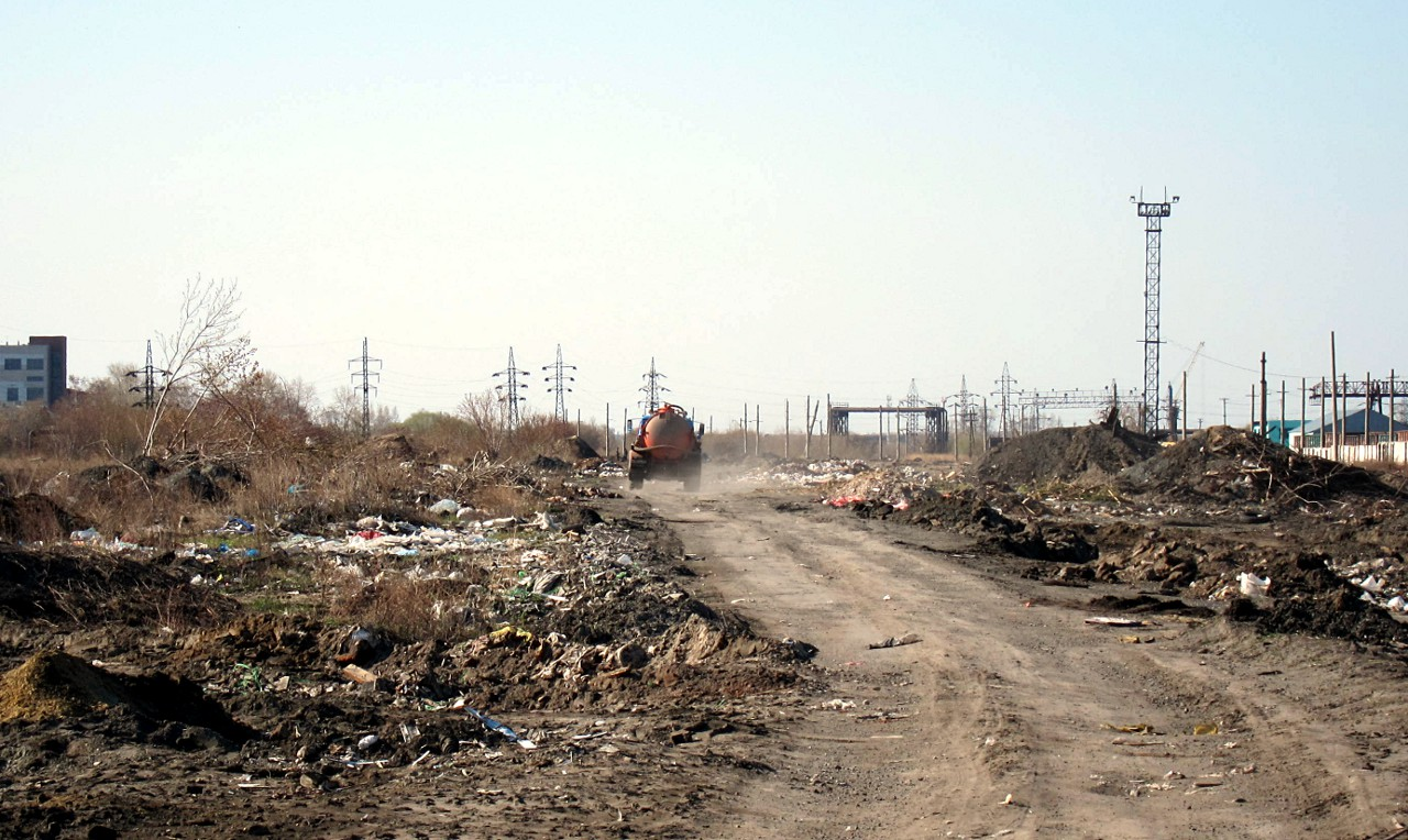 Свалка на месте бывшей сортировочной станции